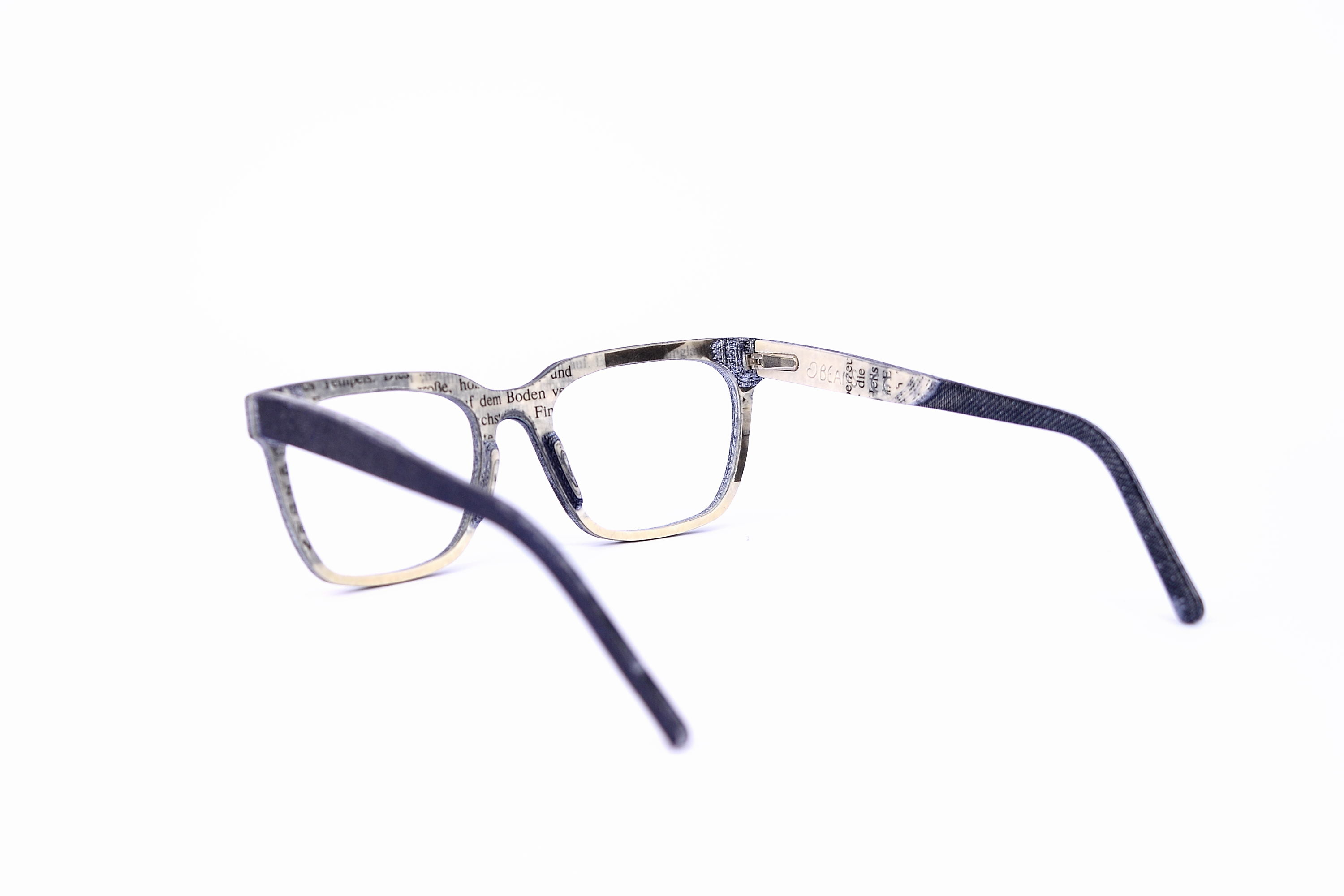 Ein Brillenfassung die zur Gänze aus kaputten Jeans und alten Büchern besteht.